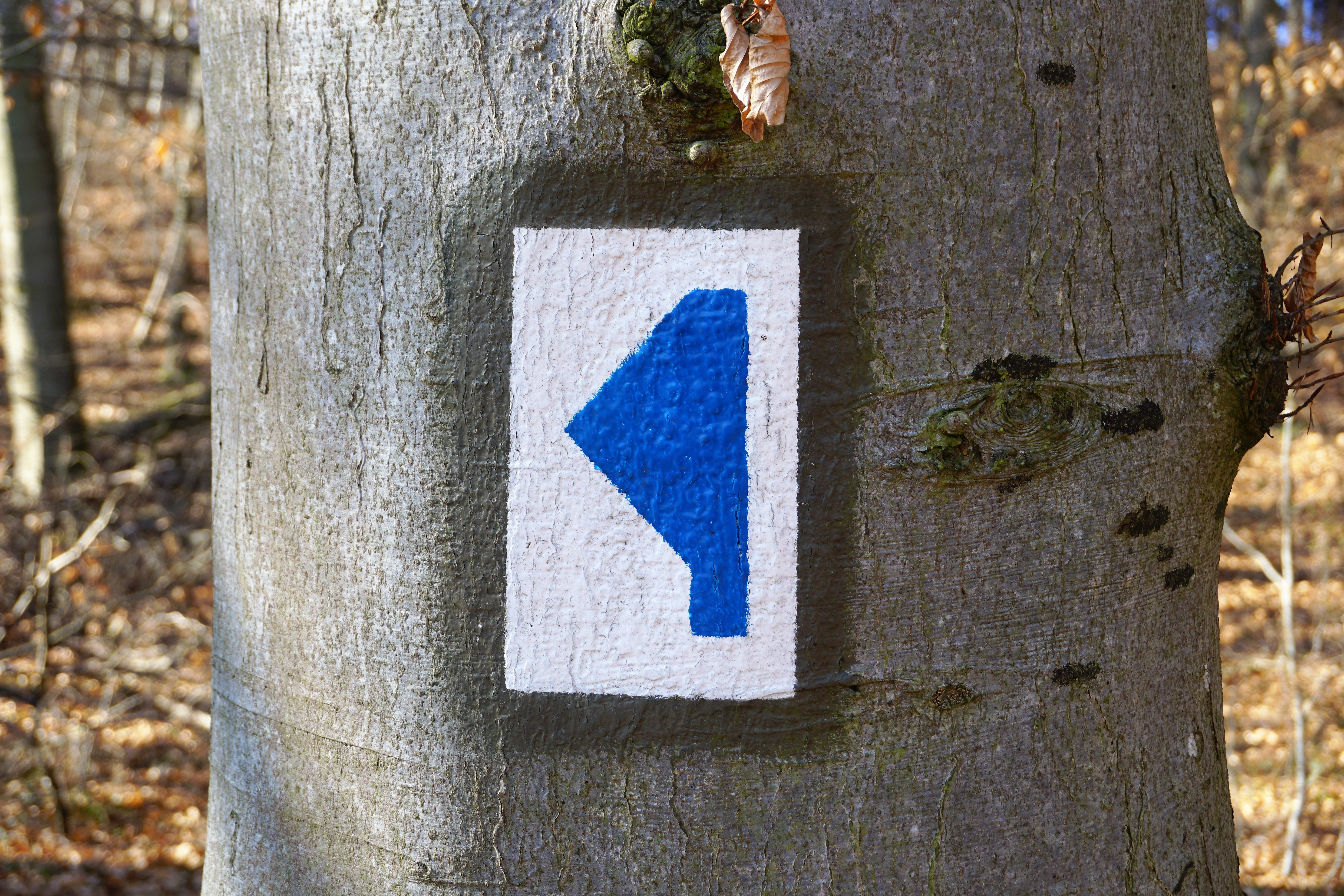 fléchage d'un Circuit auto-pédestre du Ministère de l'économie (direction générale du tourisme), Luxembourg